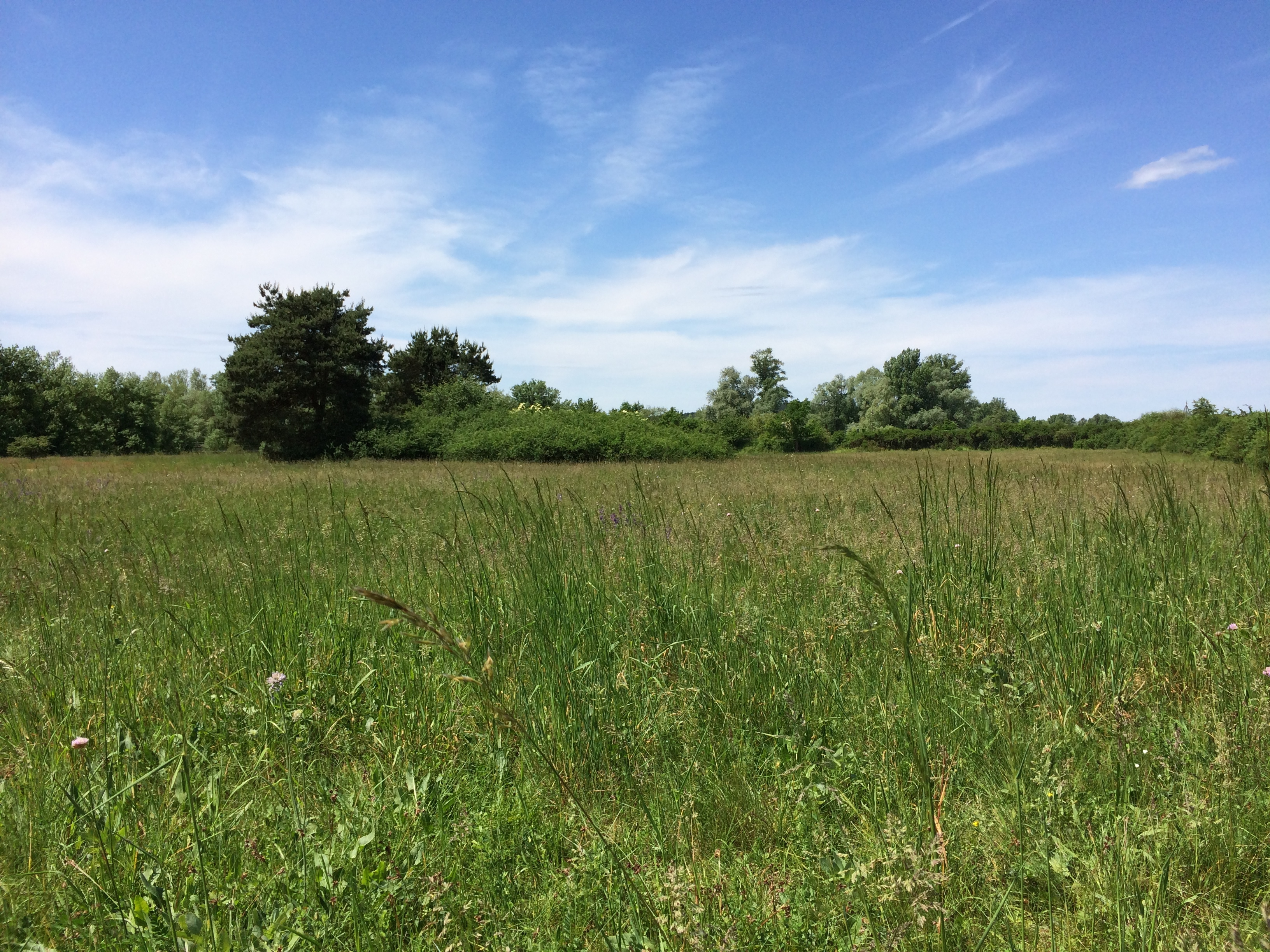 Sandgrasheide Pettstatd, Naturschutzgebiet Bayern, Oberfranken